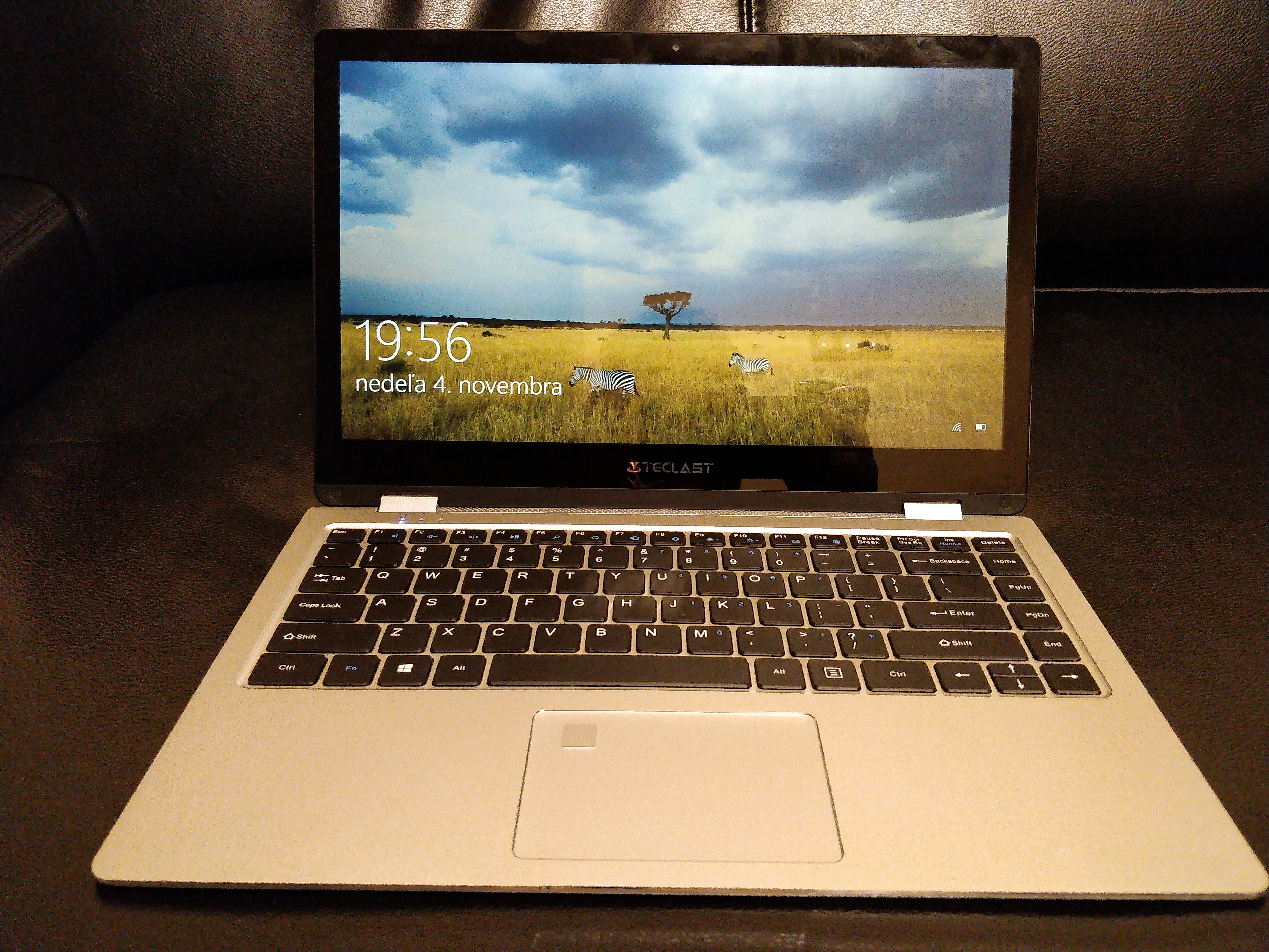 Teclast F6 Pro